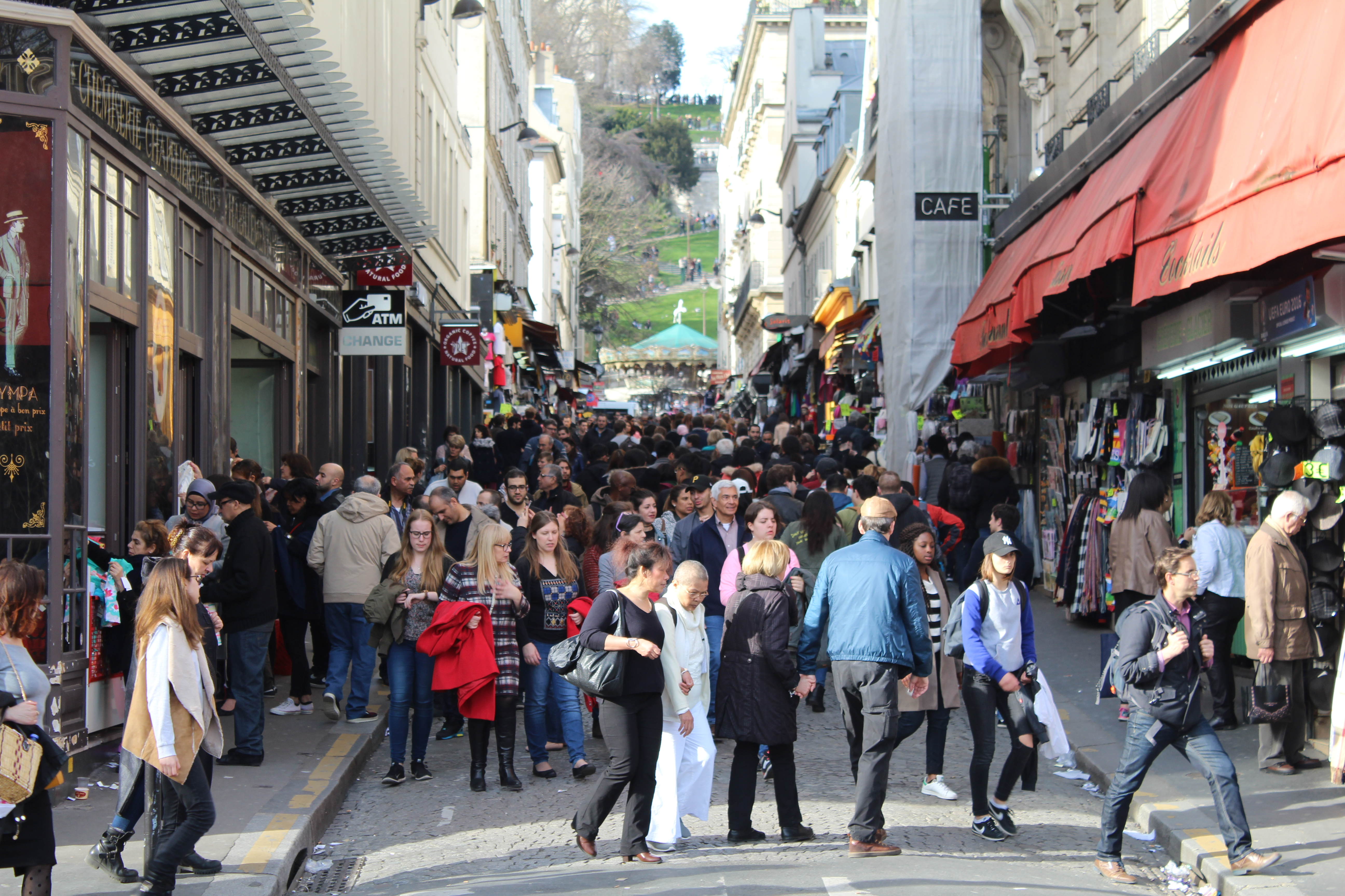 Rue de Steinkerque à Paris bondée de touristes.